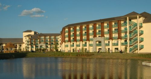 Army Public Affairs picture of Shades of Green MWR resort at Walt Disney World. Source : photo officielle fournie par le service des armées américaines pour le centre de villégiature de l'armée à Walt Disney World.